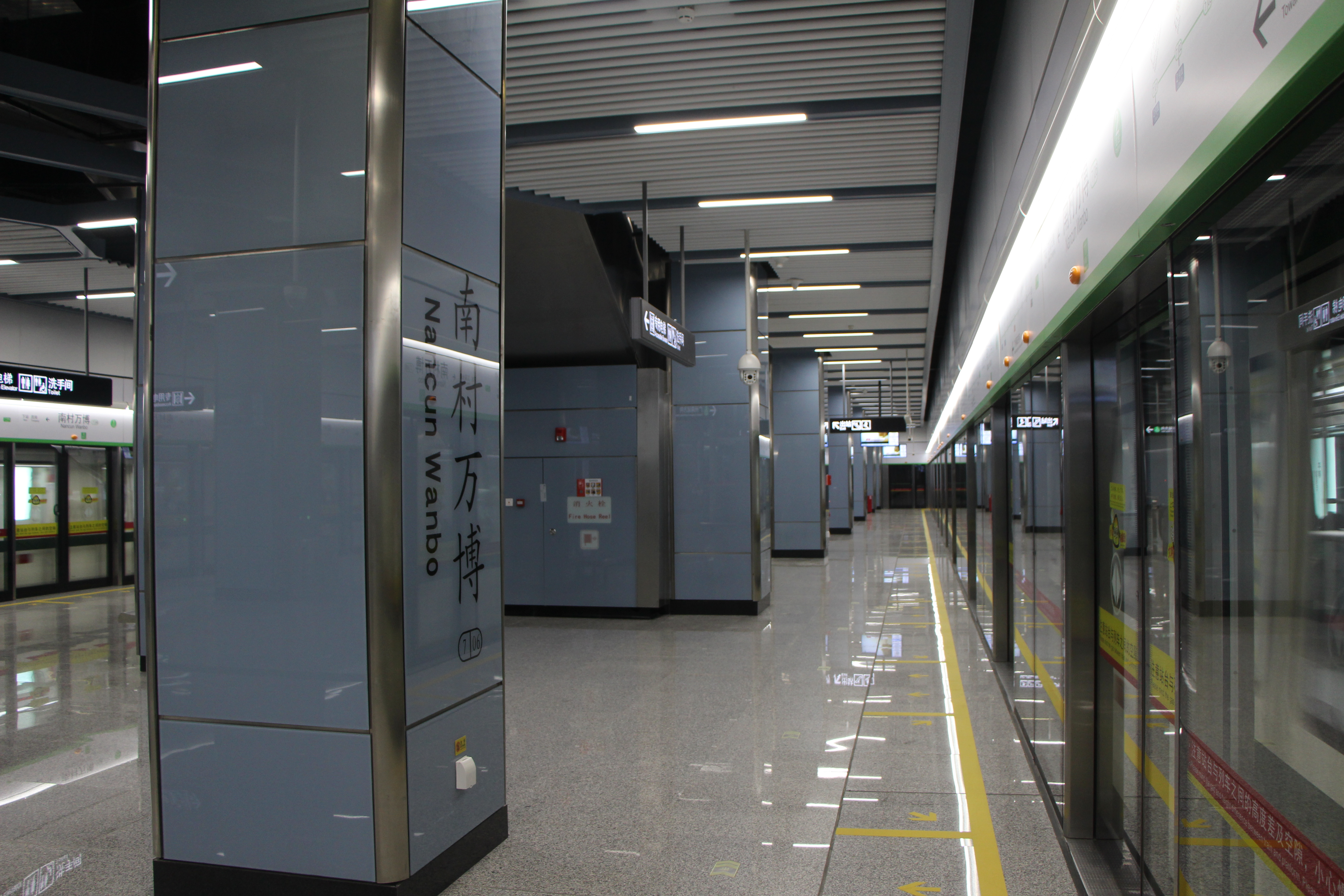 广州地铁南村万博站